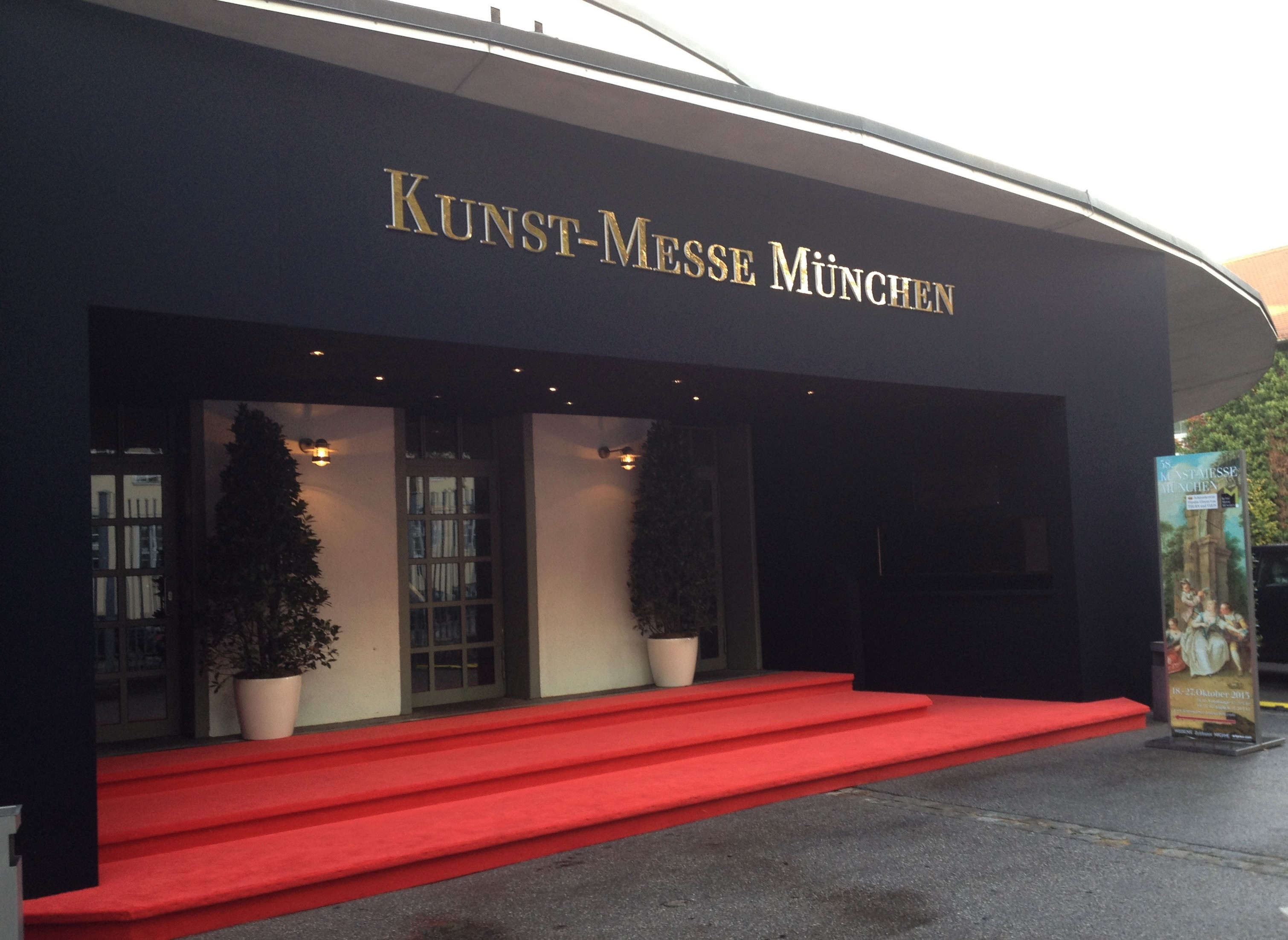 Entry of "Kunstmesse München" 58 (2013), Main Gate, Postpalast Munich